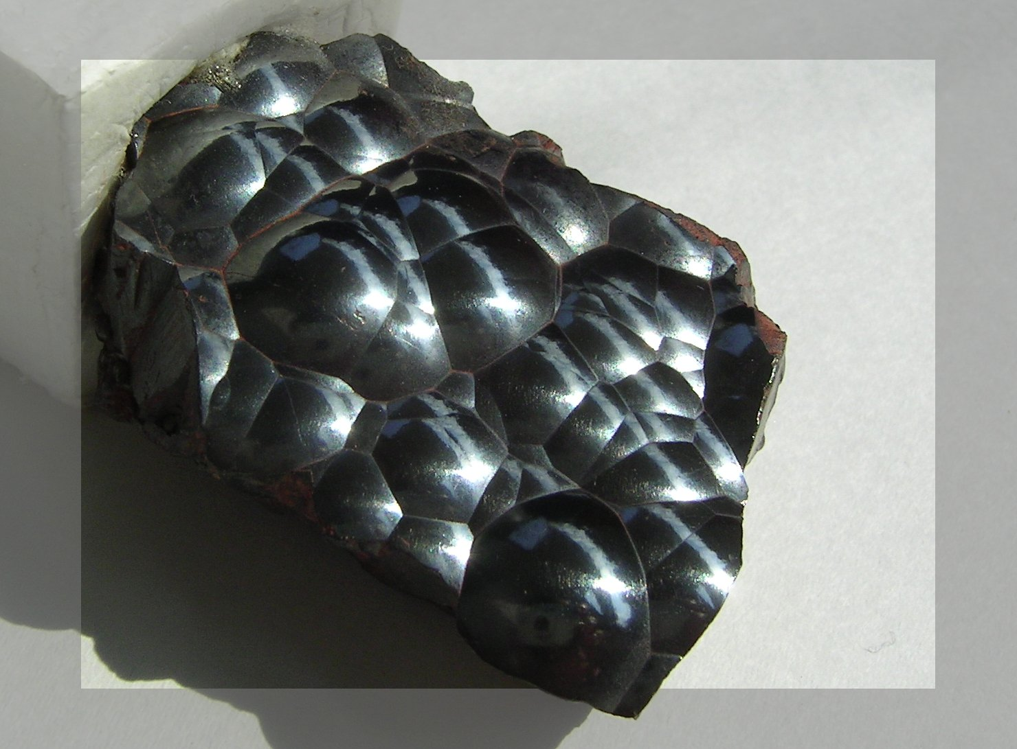 (en) Hematite (de) Hämatit Aufnahmeort: Bei mir zuhause Bearbeitung: GIMP Rahmen (Faser extrahieren oder so) Zugeschnitten Helligkeitswert angepasst